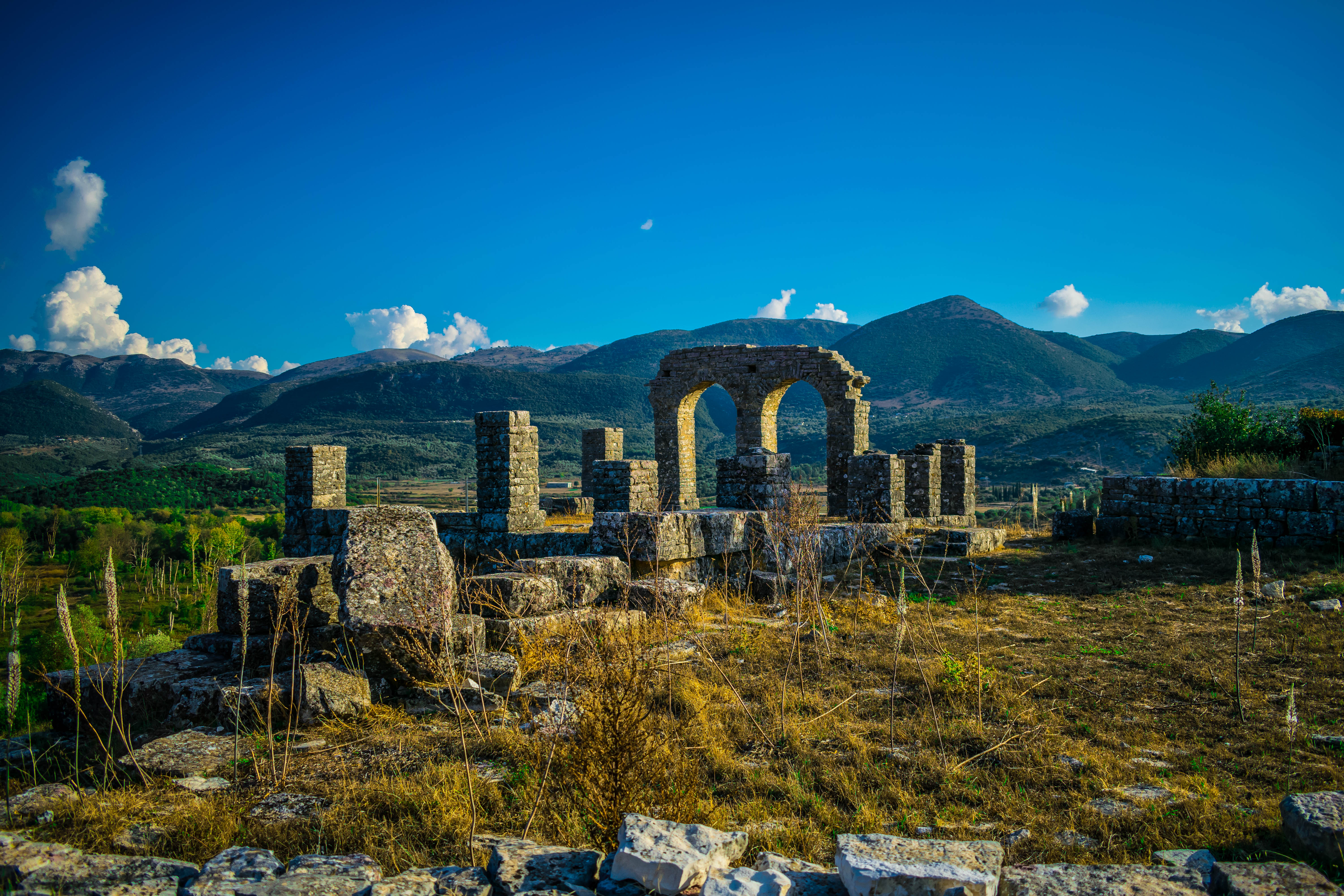 Ντόλιανη«Ντόλιανη»